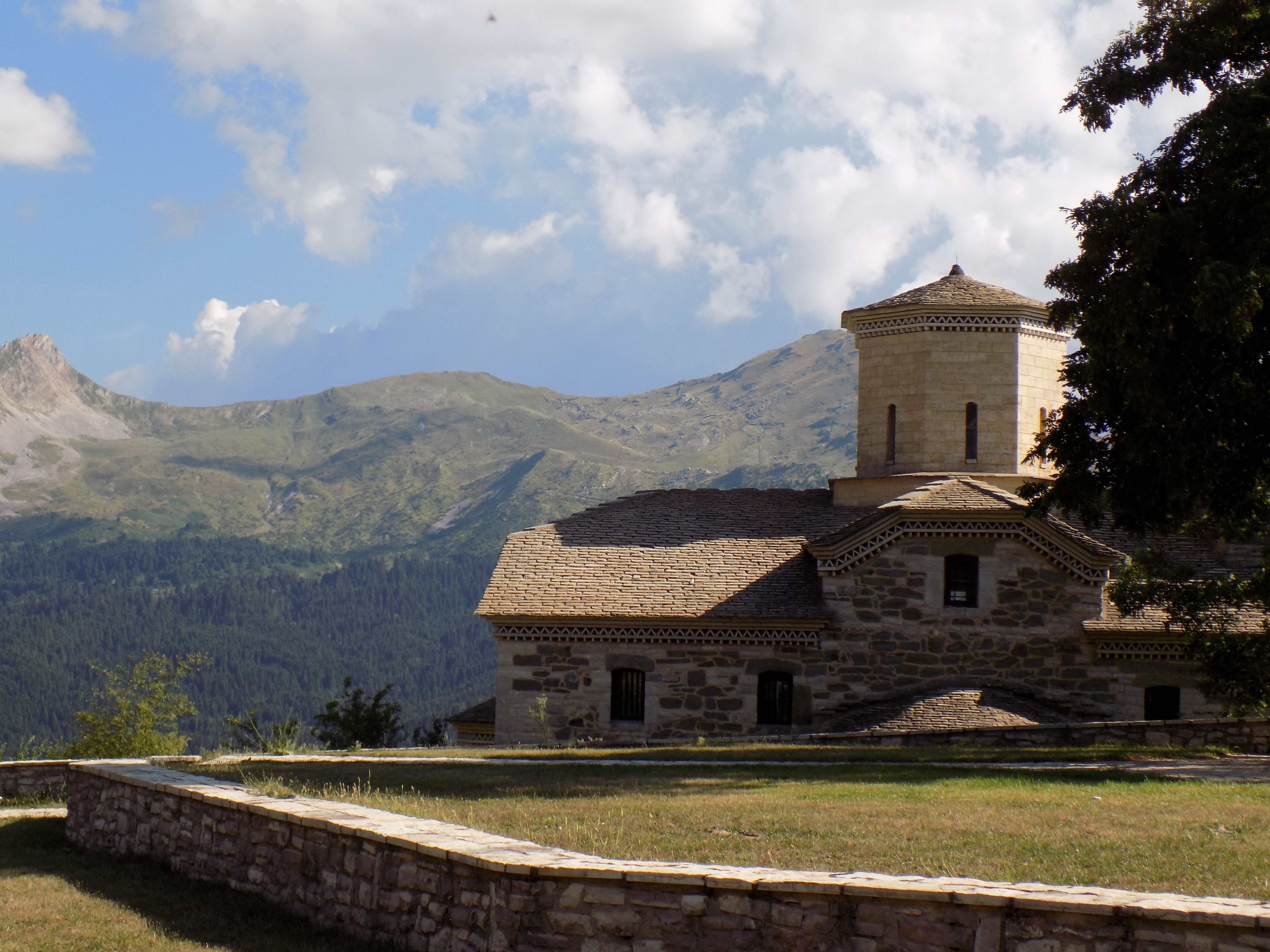 Ναός Αγ. Παρασκευής Νεραϊδοχωρίου«Ναός Αγ. Παρασκευής Νεραϊδοχωρίου»